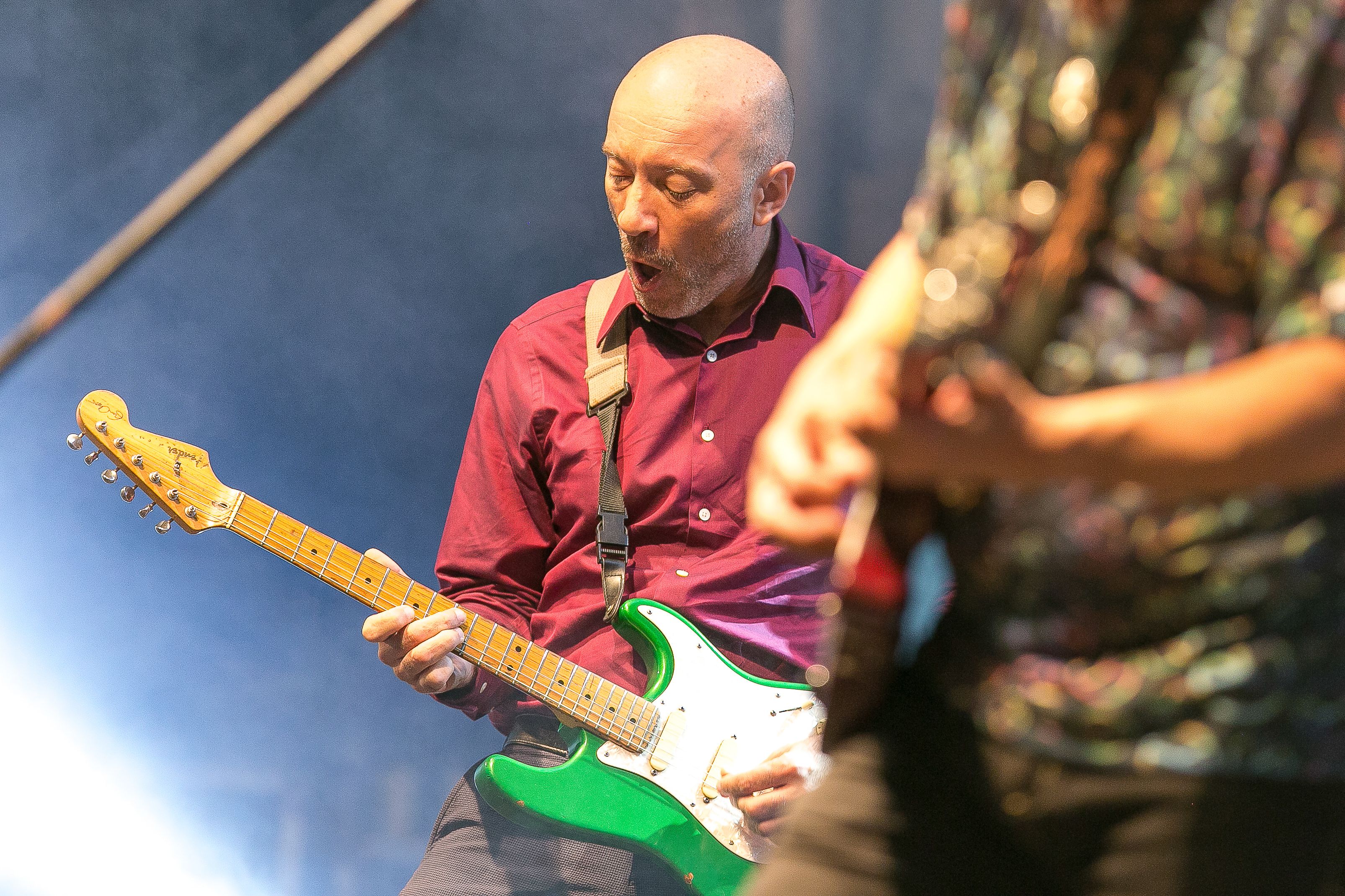 Músico Edgard Scandurra